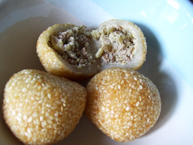 Onde-onde